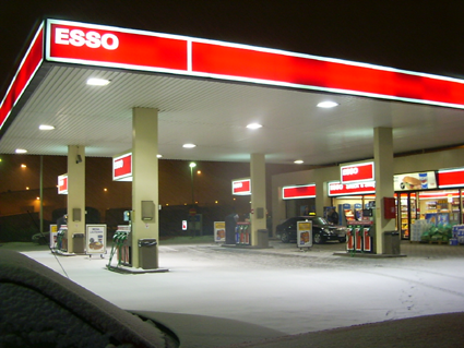 esso station finland